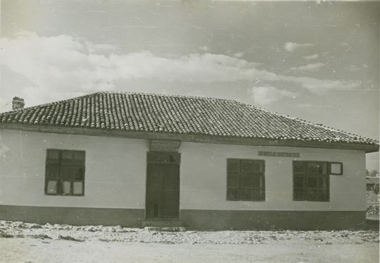 Начално училище „Климент Охридски“ в село Челопечене, Добричко.